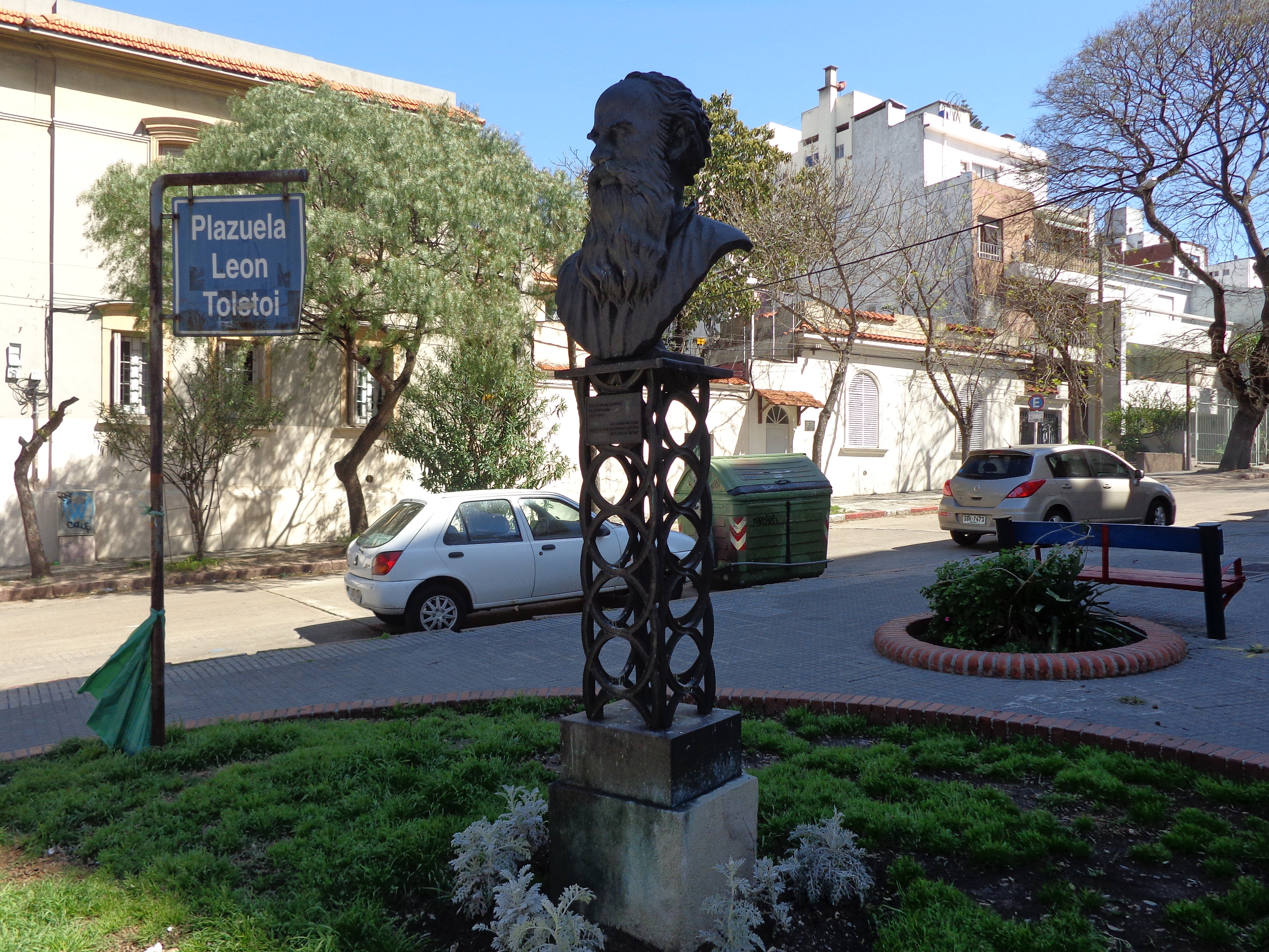 León Tolstoi (busto). Ubicada en el departamento de Montevideo